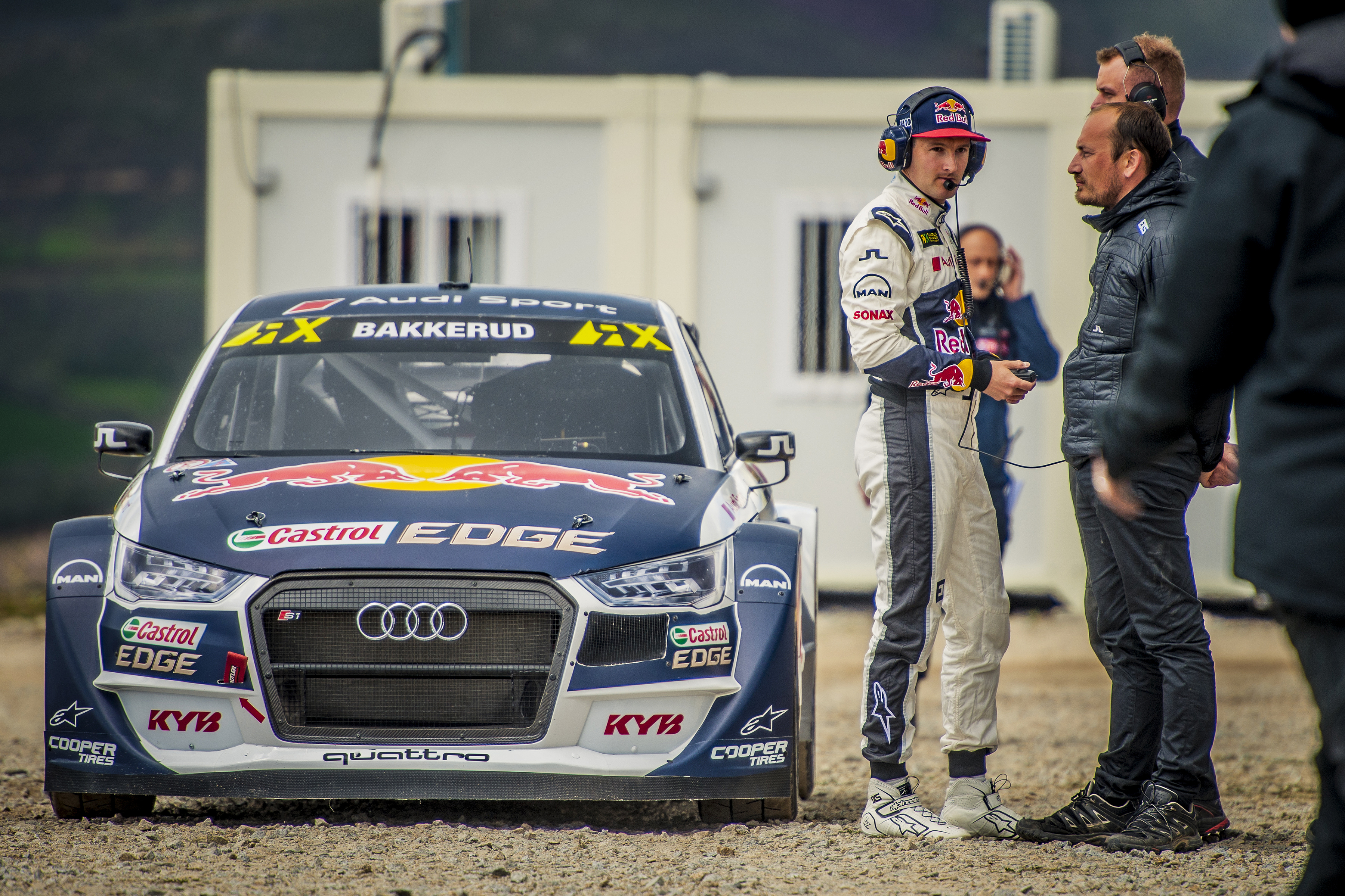 _DSC6113